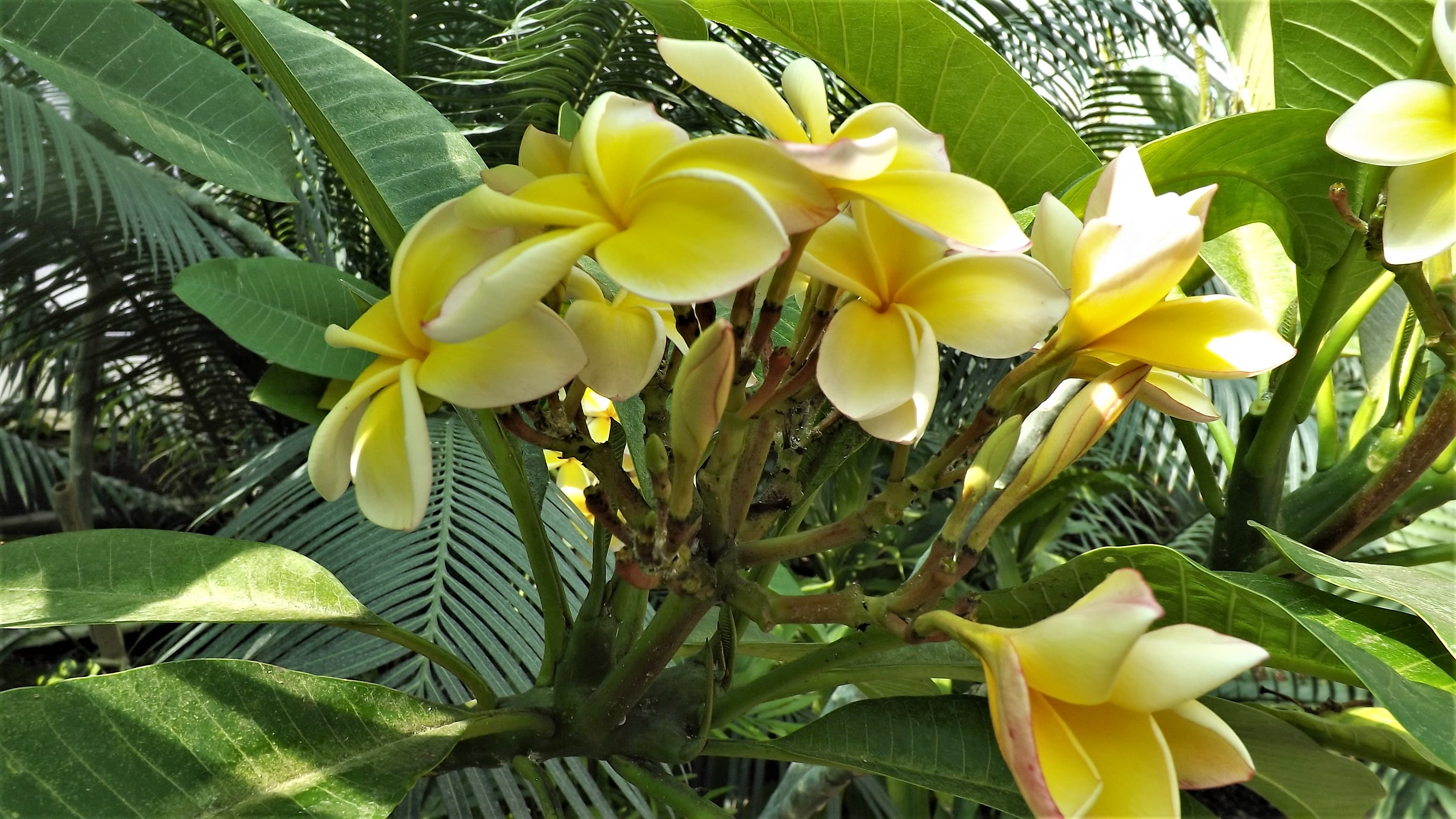 Vácrátóti botanikuskert üvegháza